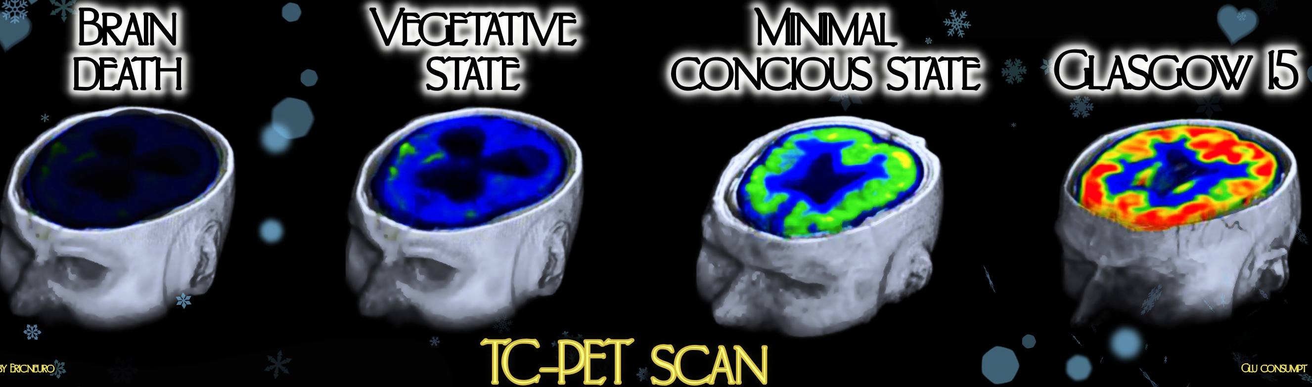 Variação do consumo de glicose em diversos nivéis da consciência. Imagens obtidas em pacientes diferentes com PET-SCAN cerebral com marcador para consumo de glicose FM-UFMG